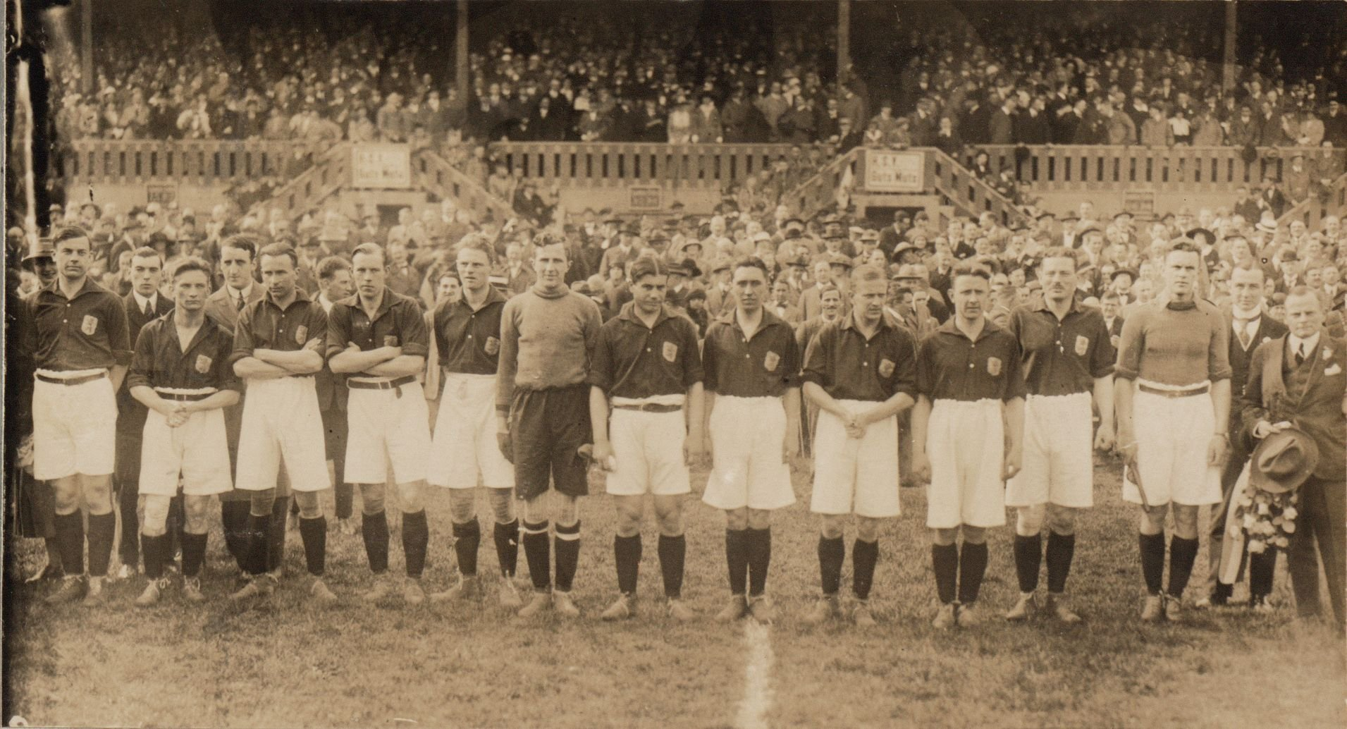 Nederlands elftal voor de interland tegen Duitsland. Van links naar rechts: Dolf Heijnen, Wim Addicks, Harry Denis, Arie Bieshaar, Evert van Linge, Jan de Boer, Jo Jole, Ber Groosjohan, Dick Sigmond, Andre le Fevre, Eb van der Kluft en grensrechter, tevens reserve, Hans Tetzner.